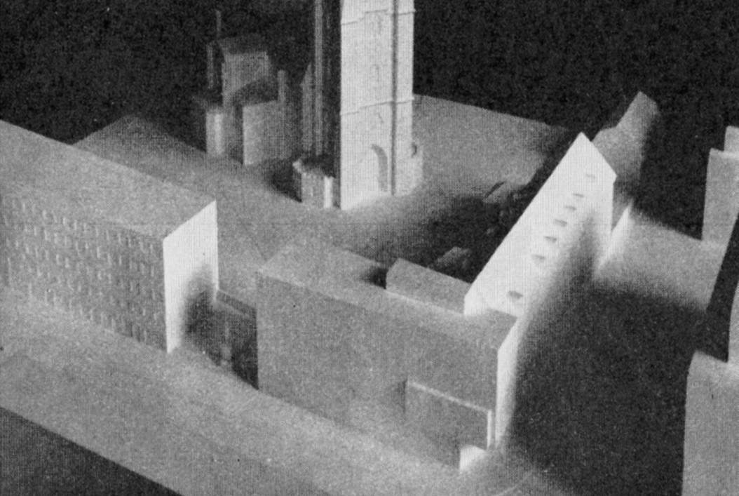 Modell, tävlingsbidrag "Domus" för nybyggnaden Klarabergsgatan 37, Stockholm